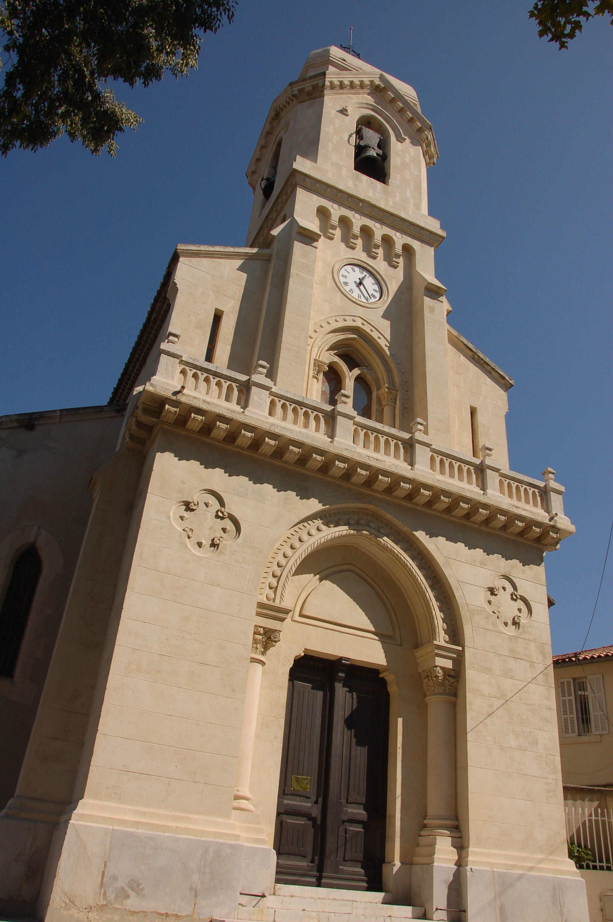 L'Église Sainte-Marthe est située sur le Plateau de l'Église, dans le quartier Sainte Marthe de Marseille (14ème)